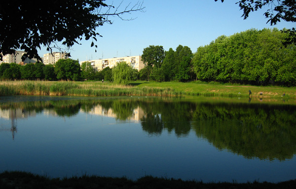 Lviv, park "Horikhovyi Hay"